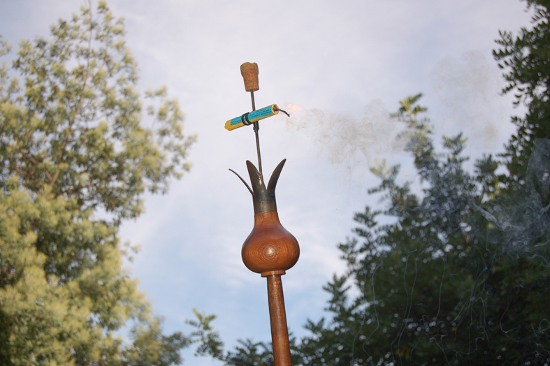 Maça Ball de Diables de Sabadell